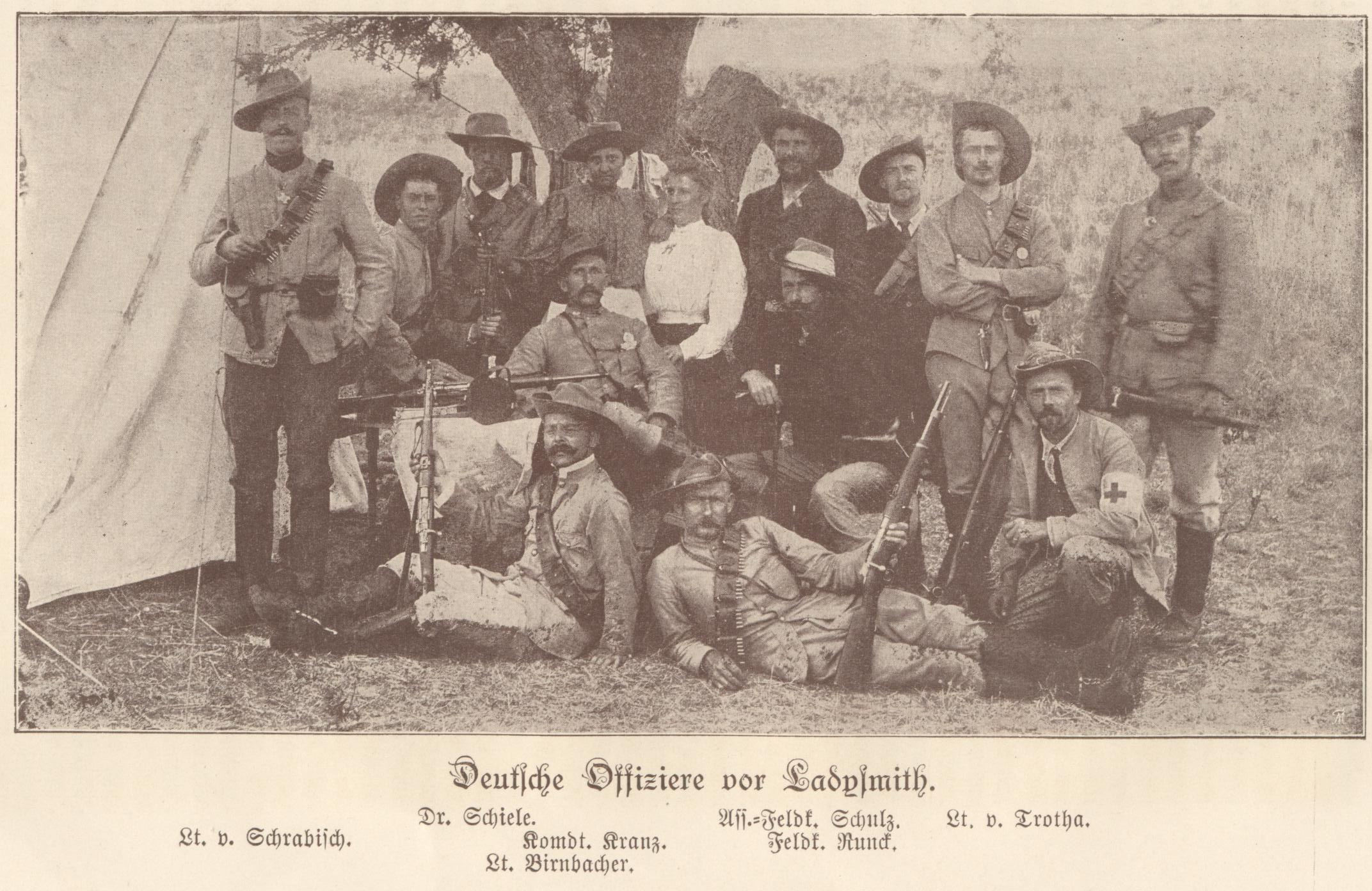 Richard Runck, Kommandant eines deutschen Freikorps im Burenkrieg